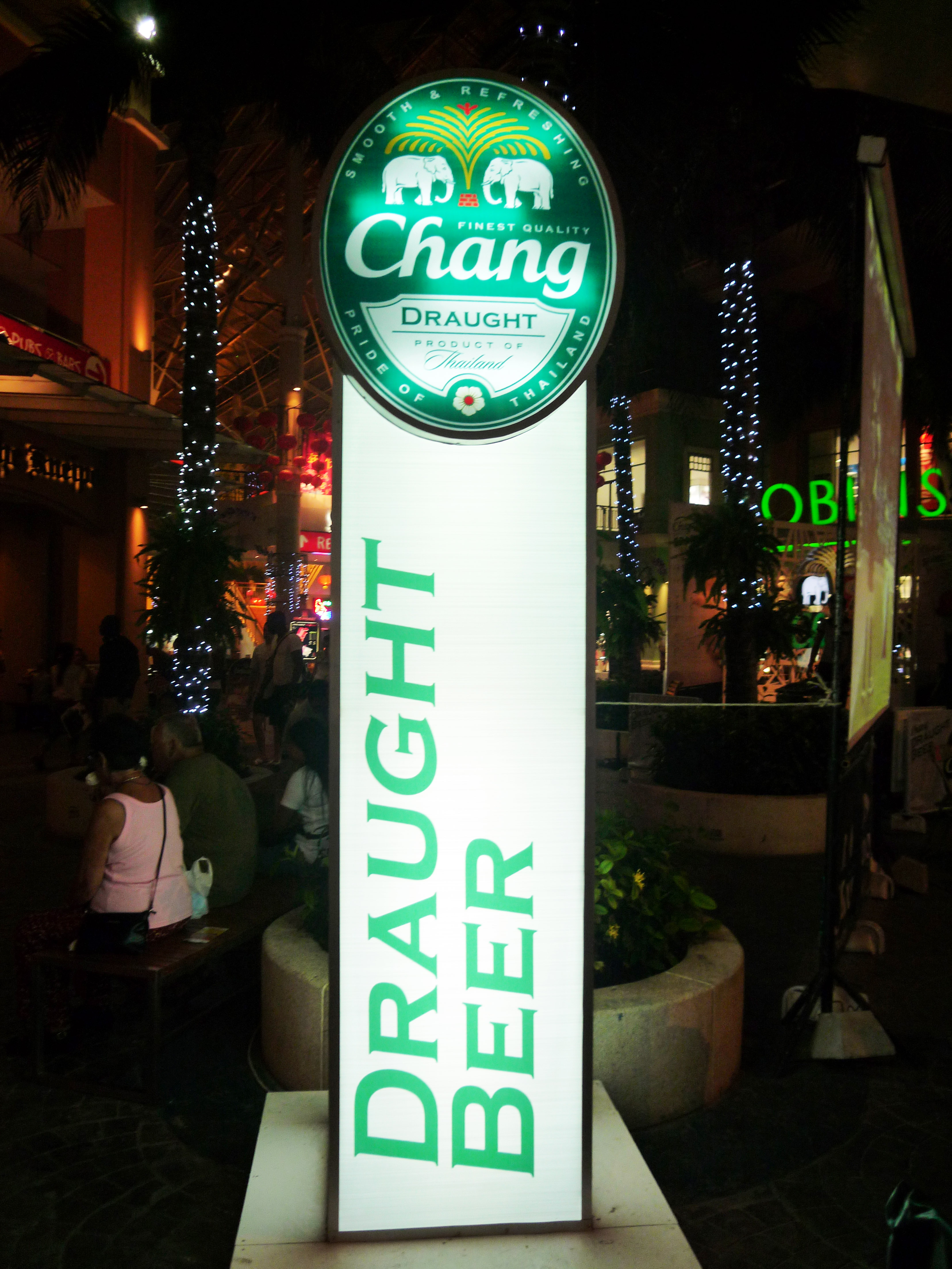 Werbung für das thailändische Chang Bier, Phuket, Thailand